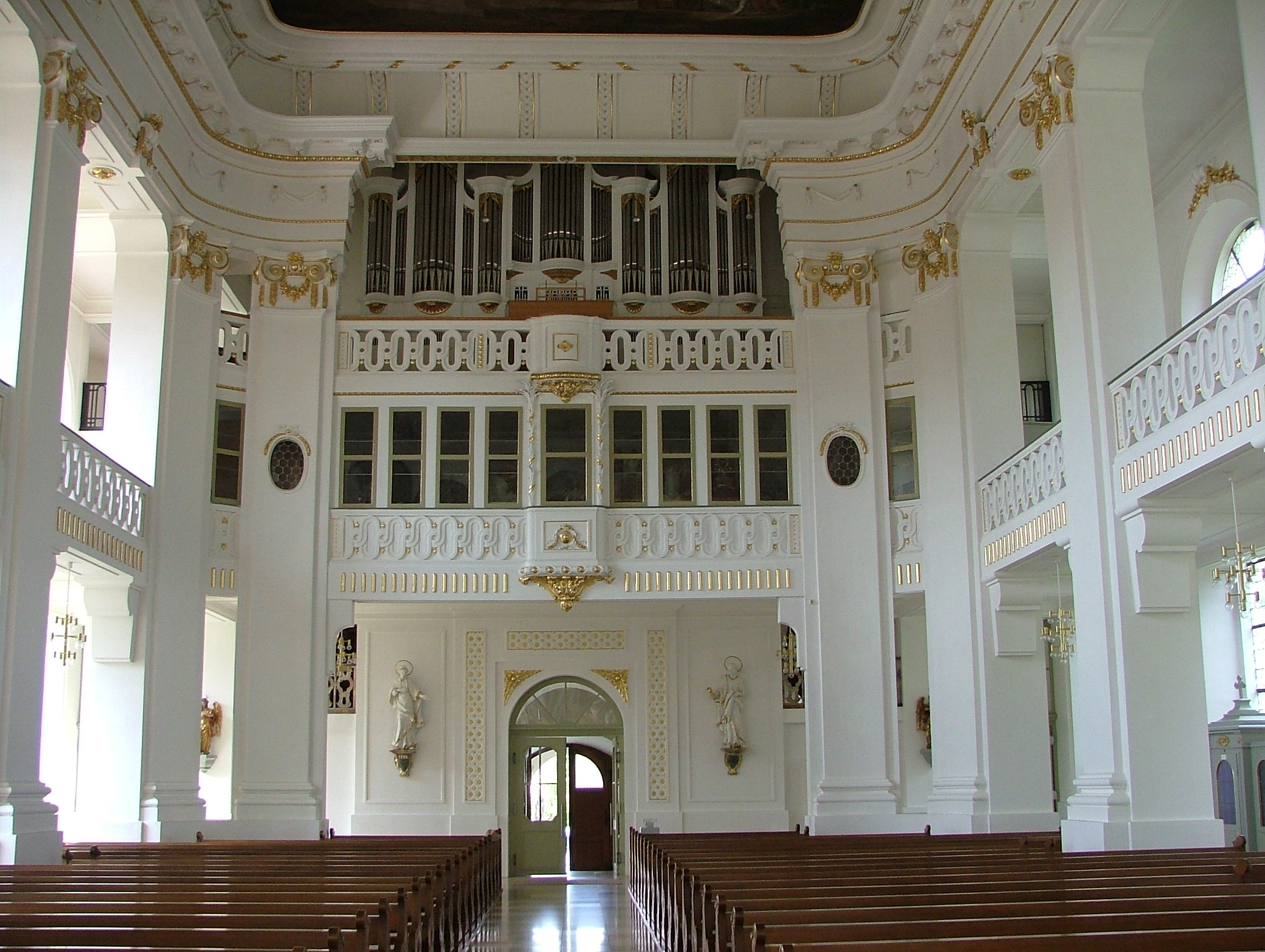 Bad Wurzach Orgelprospekt im klassischen Stil